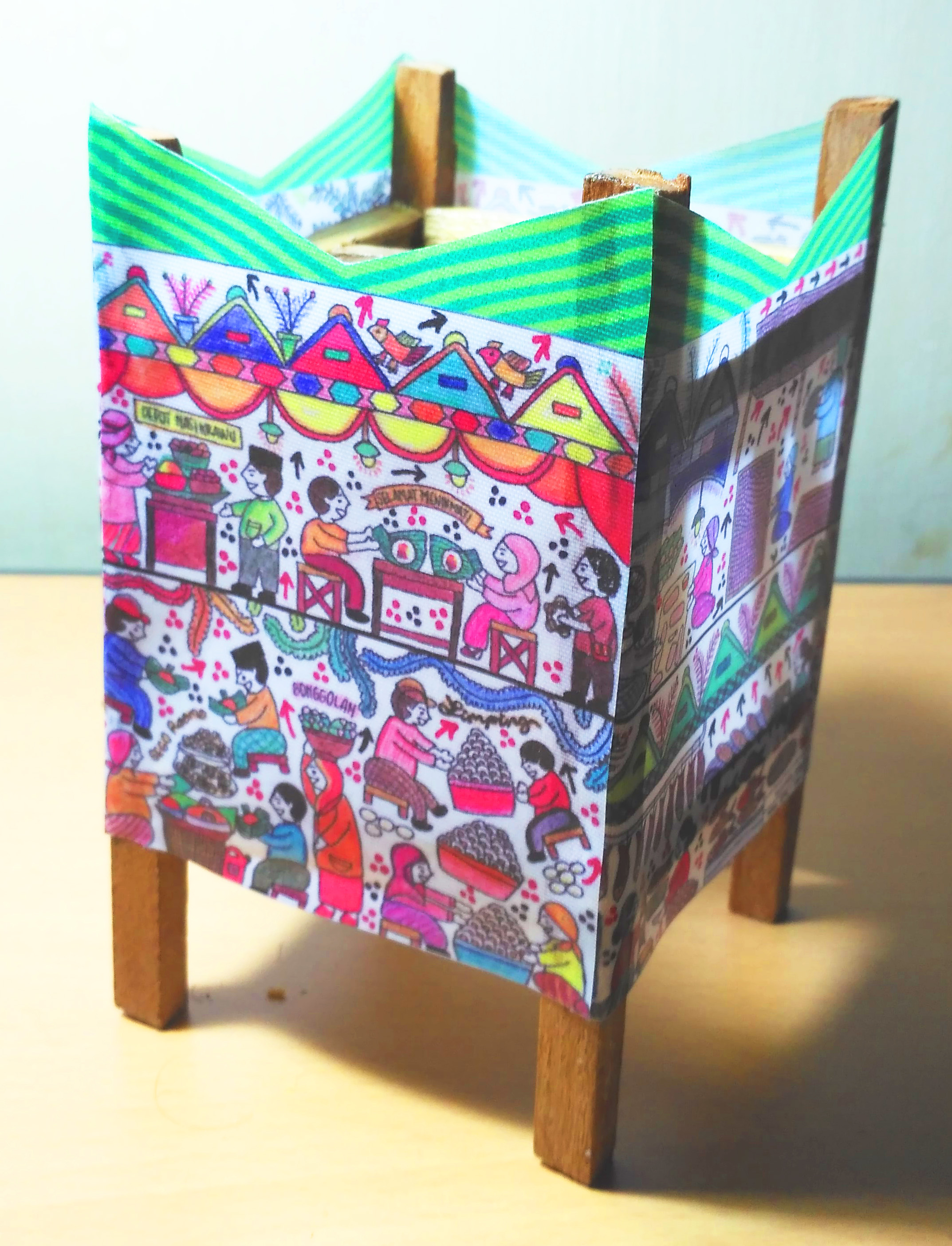 Lentera Damar Kurung dari Gresik, dibuat oleh Otak Atek Gresik